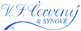 Logo von V. F. Červený & Söhne